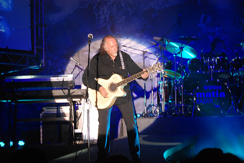 piero cassano da flickr